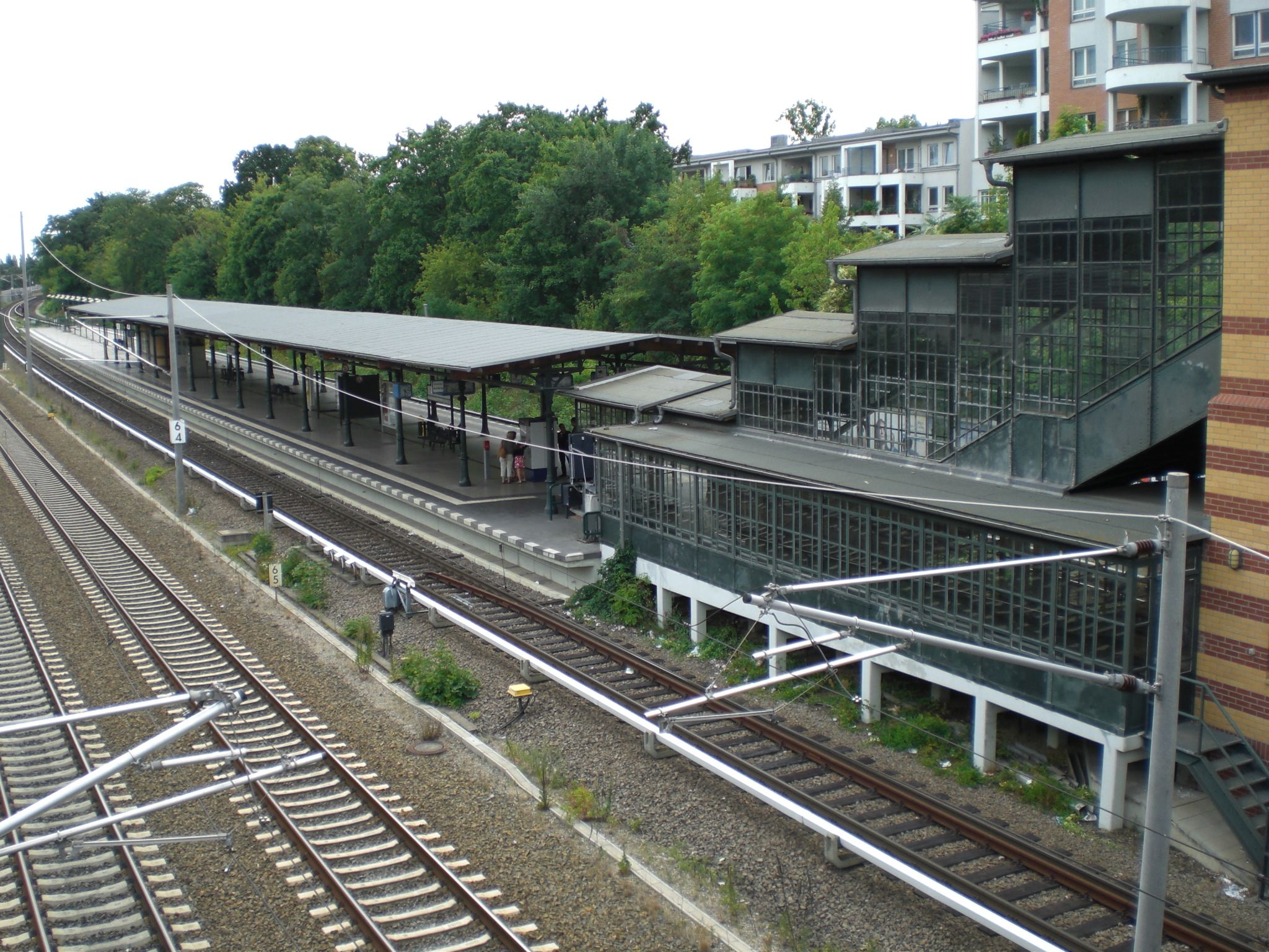 S-Bahnhof Südende in Berlin. Blick von der Brücke des Steglitzer Damms. Im Vordergrund die Gleise der Anhalter Bahn.